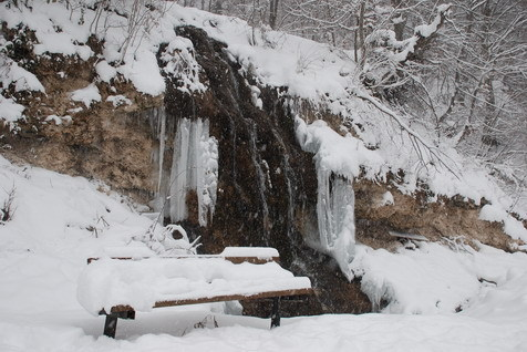 Lukovska Banja-klupa